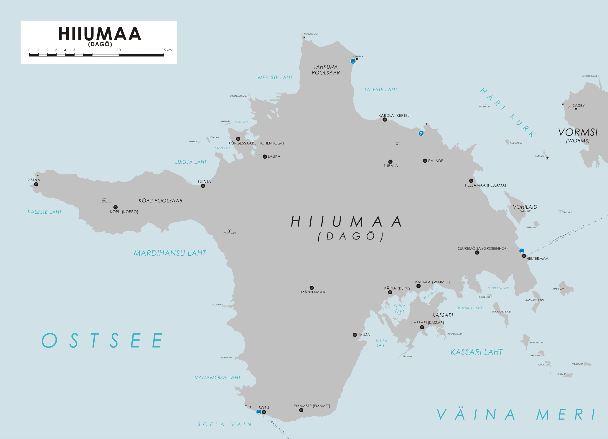 Karte der Insel Hiiumaa (Dagö), Estland